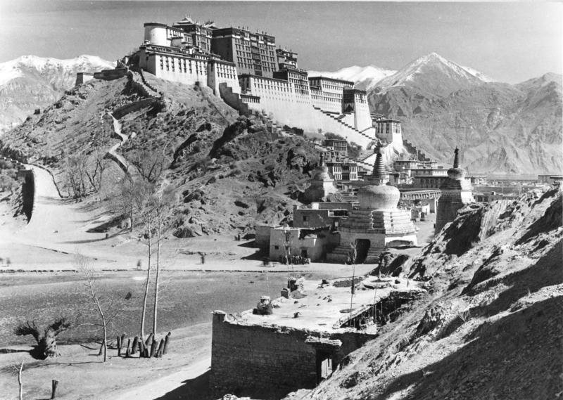 Tibetexpedition, Potala Lhasa, Potala